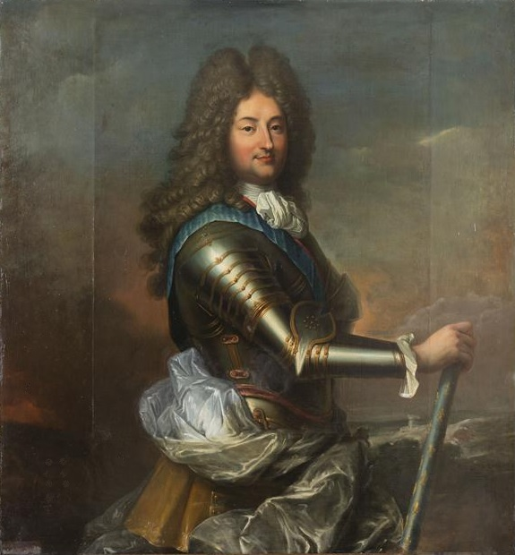 Santerre le représente dans ses fonctions de commandement.